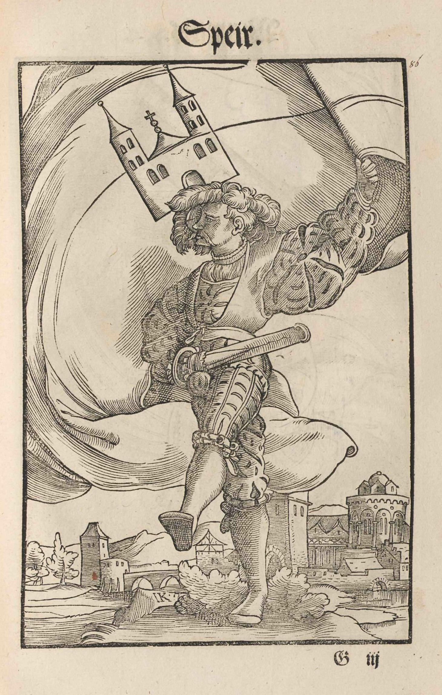 Jacob Koebel (Vorrede): Wapen. Des Heyligen Römischen Reichs Teutscher nation. Gedruckt bei Cyriacus Jacob (evtl. auch Herausgeber/Autor), Frankfurt am Main 1545, Holzschnitte von Jacob Kallenberg. Zu Angaben zur Tingierung (Farbgebung) der Wappen siehe das Register ab Bild Nr. 165. Speir (Speyer)